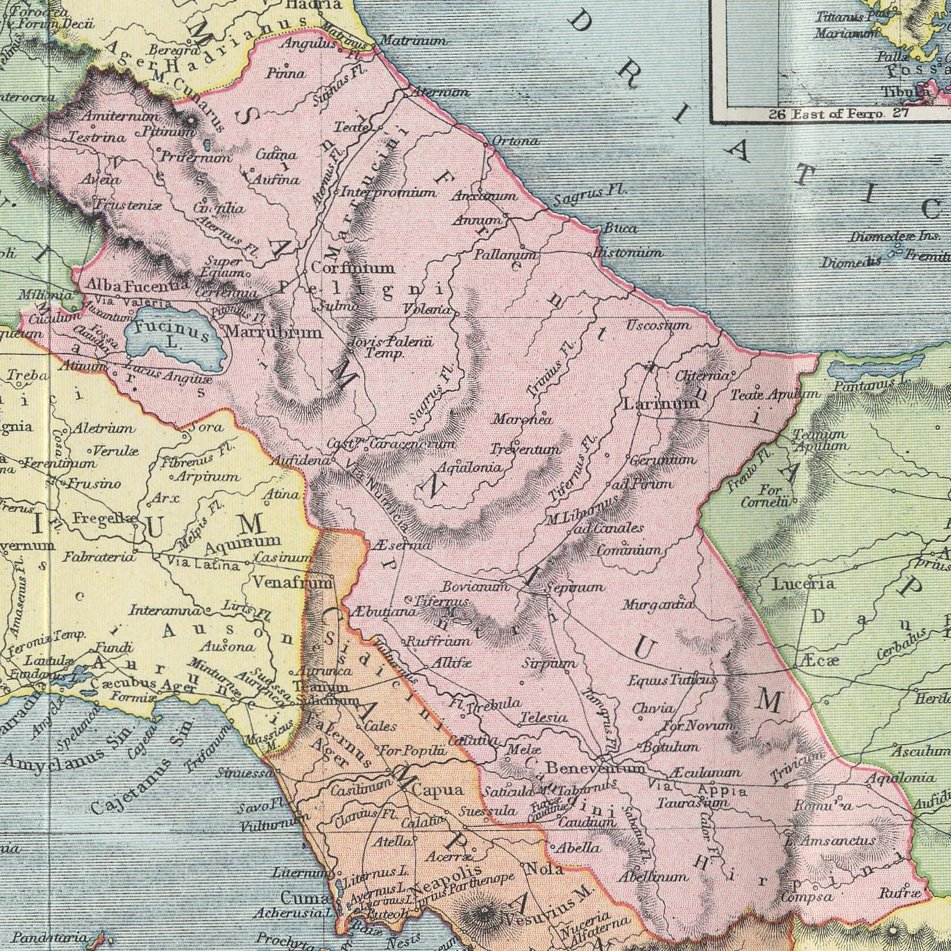 L'antica regione italiana del Sannio (Samnium)